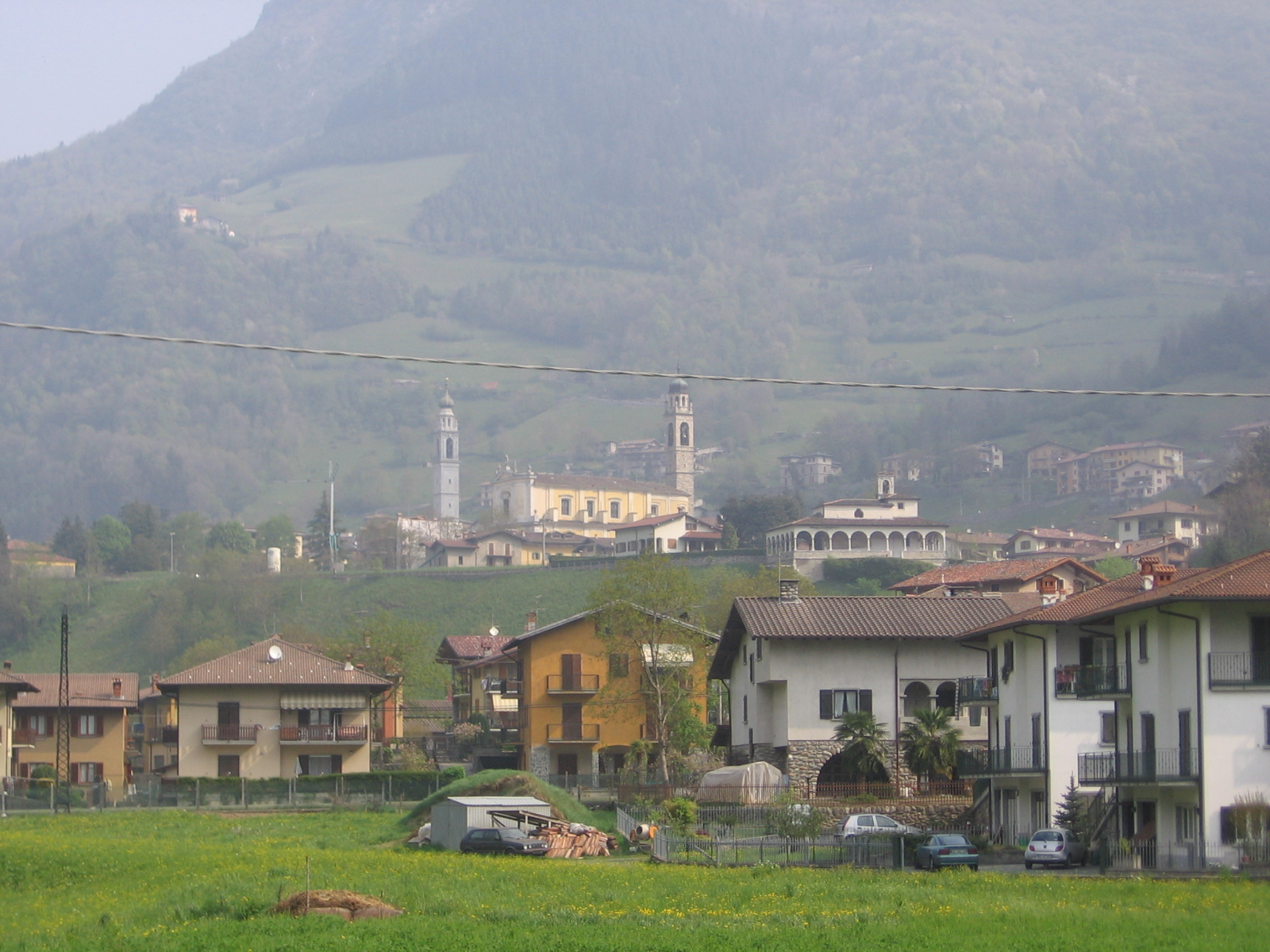 Ardesio, Bergamo, Italia